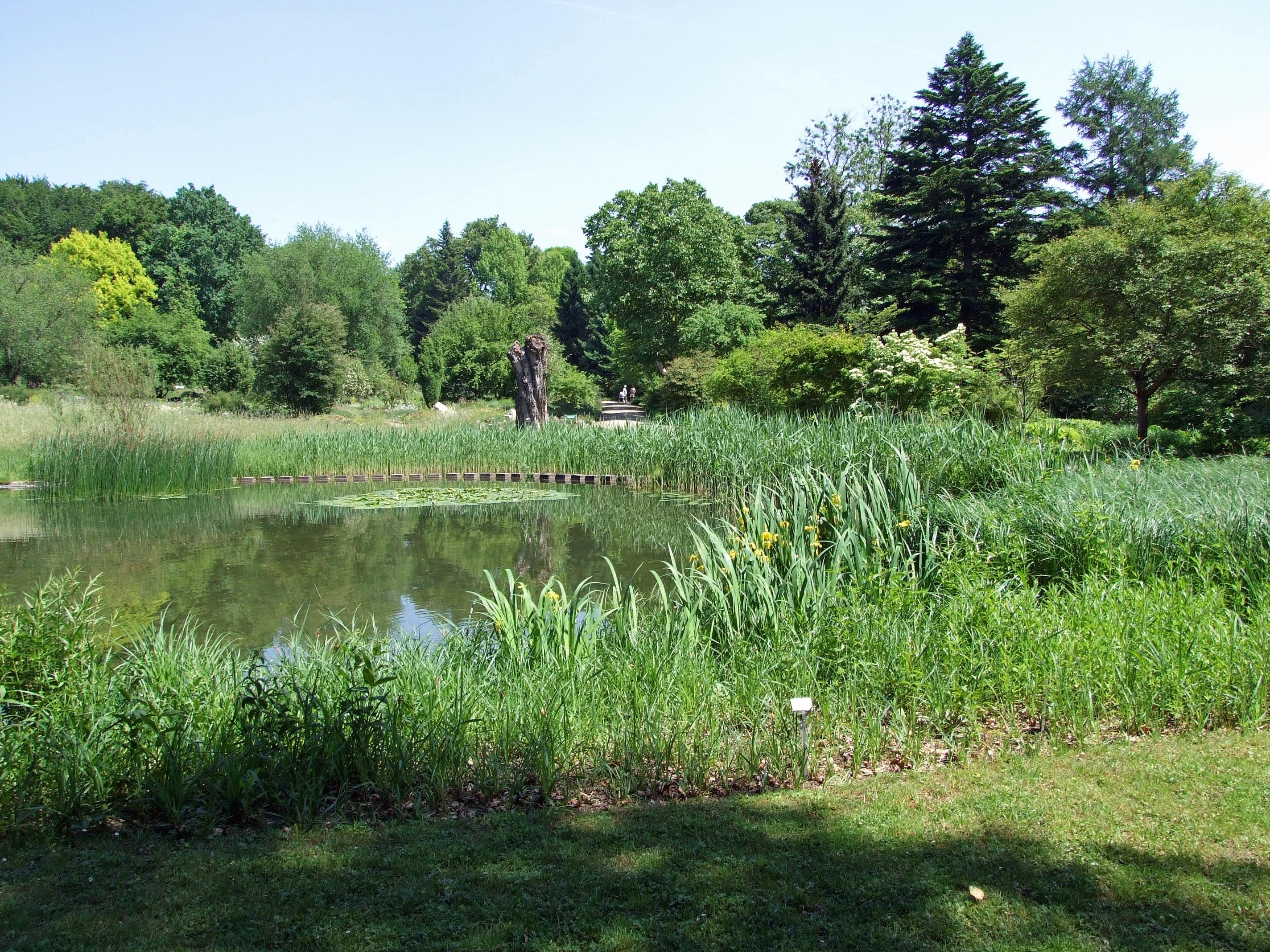 Botanischer Garten Ffm, Siesmayerstraße